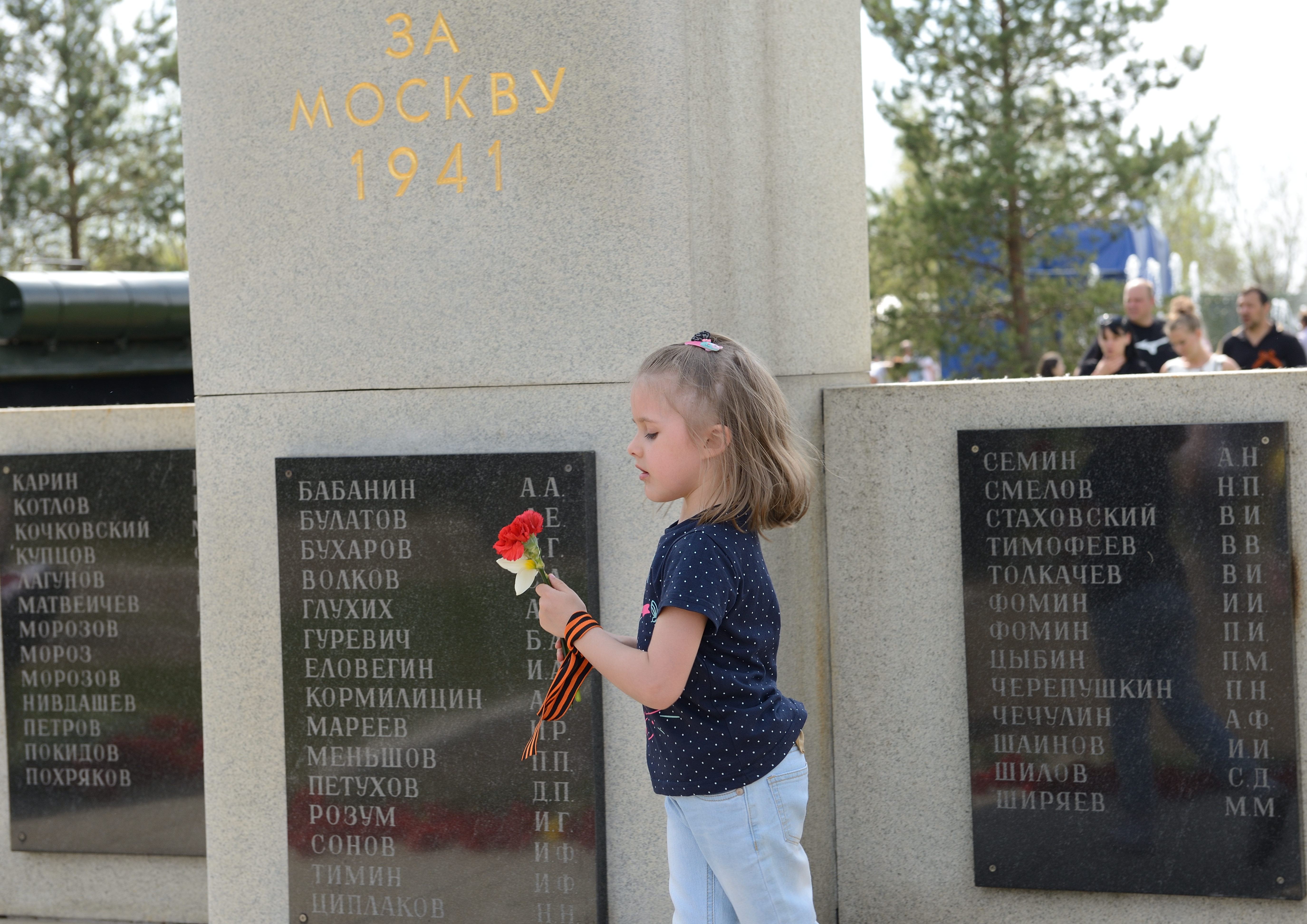 г.Москва Поселок станции Крекшино, парк Победы, у памятника